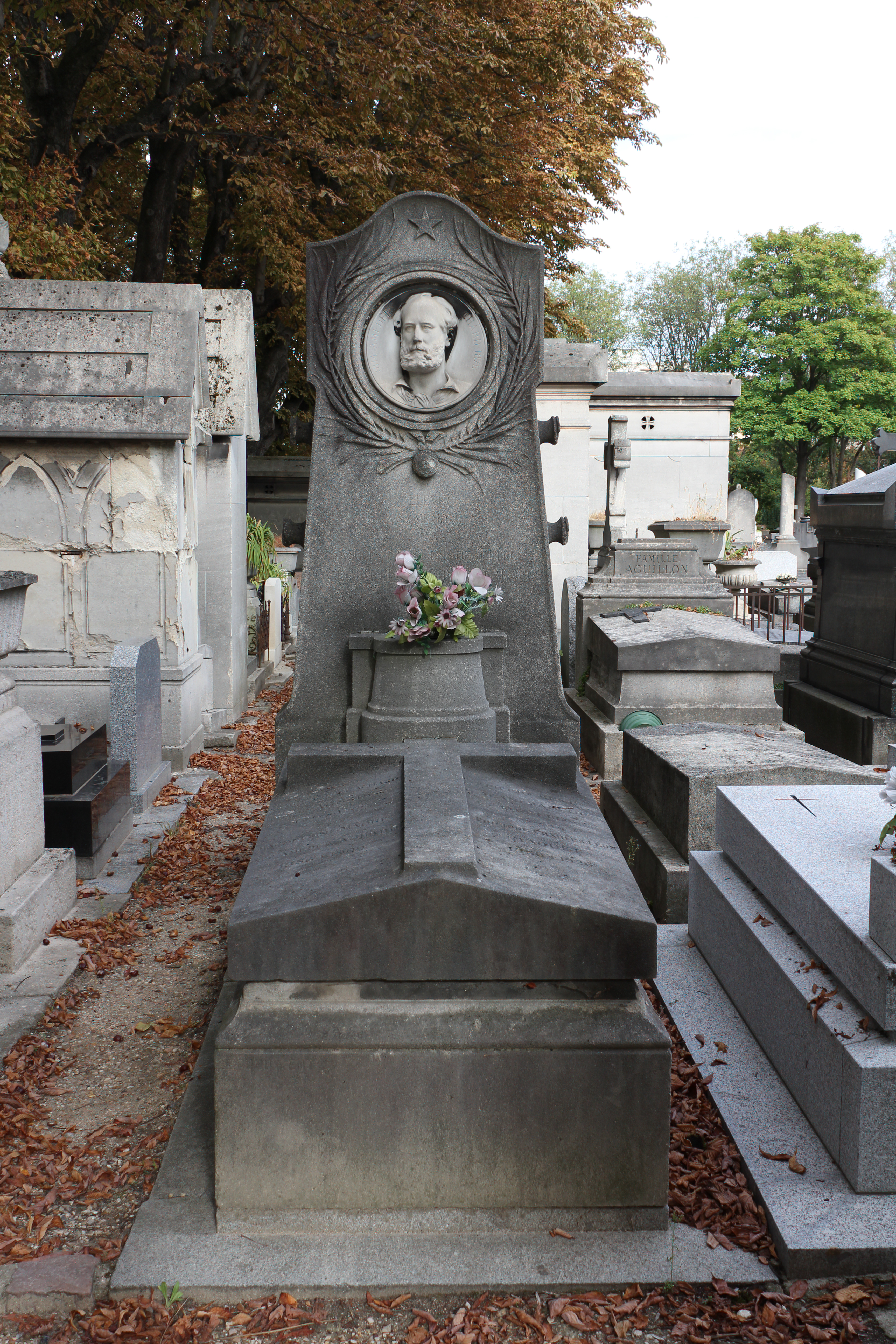 Sépulture d'Amédée Achard (1814-1875), romancier et auteur dramatique. Stèle en granit ornée d'une demi-ronde bosse en marbre blanc signée Ch. Janson.